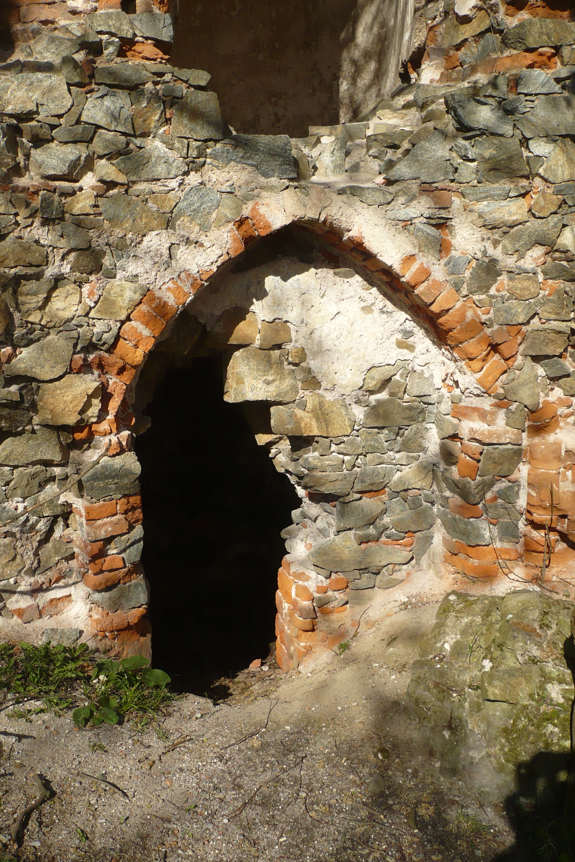 Wieża na Grodziszczu